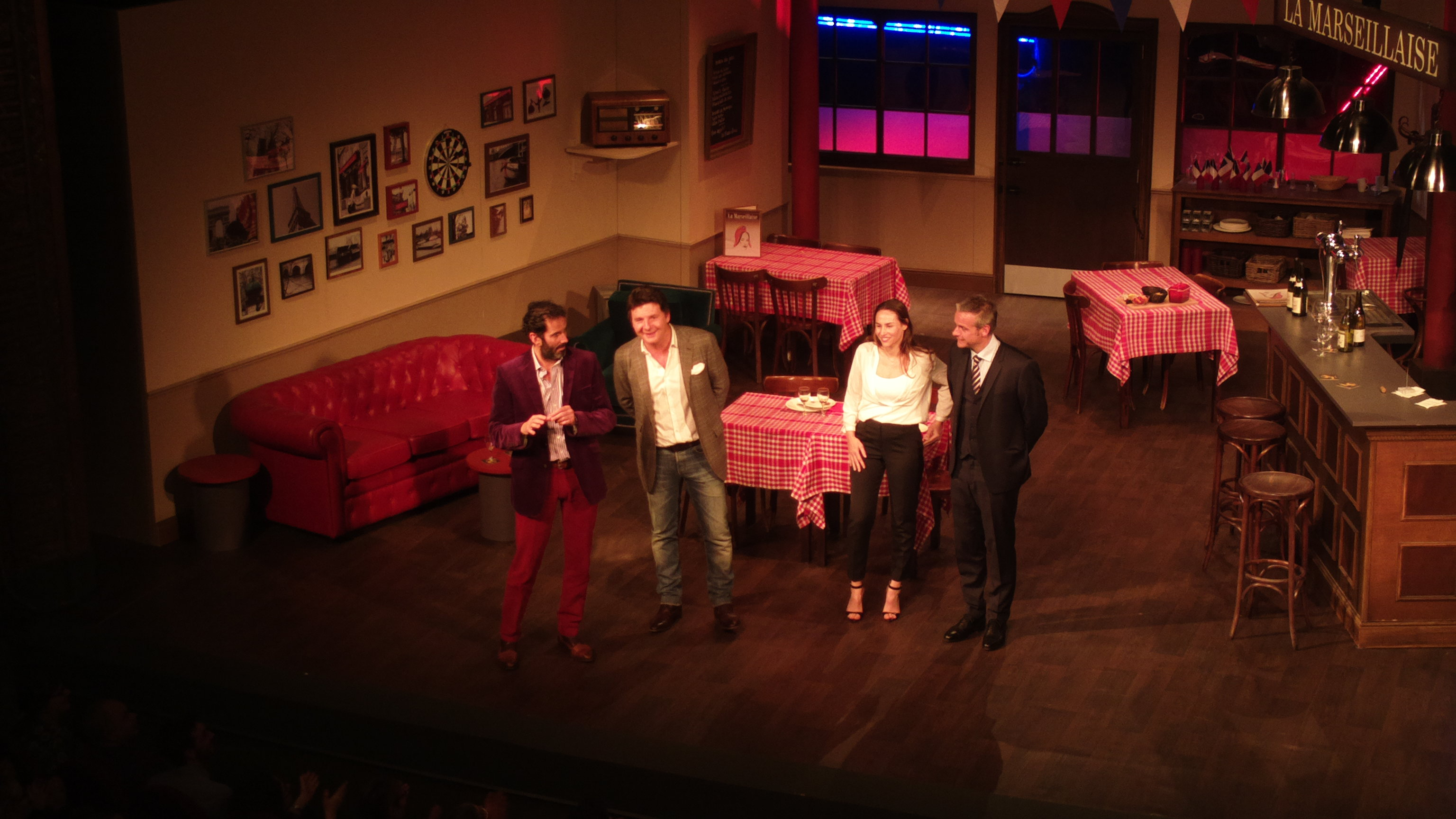 "L'appel de Londres" de Philippe Lellouche Avec Vanessa Demouy, Philippe Lellouche, David Brécourt et Christian Vadim au Théâtre du Gymnase